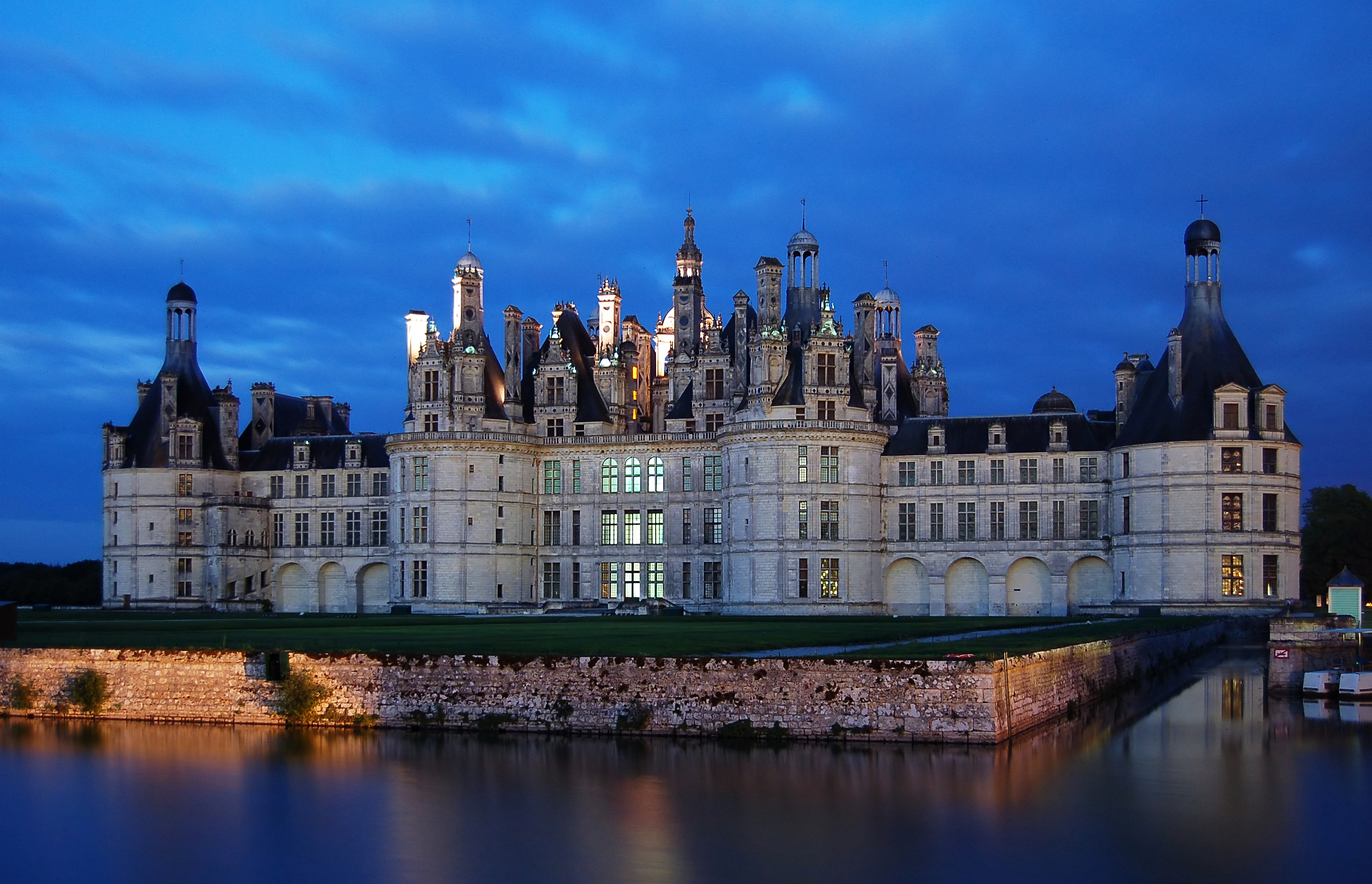 Schloss Chambord (nachts)